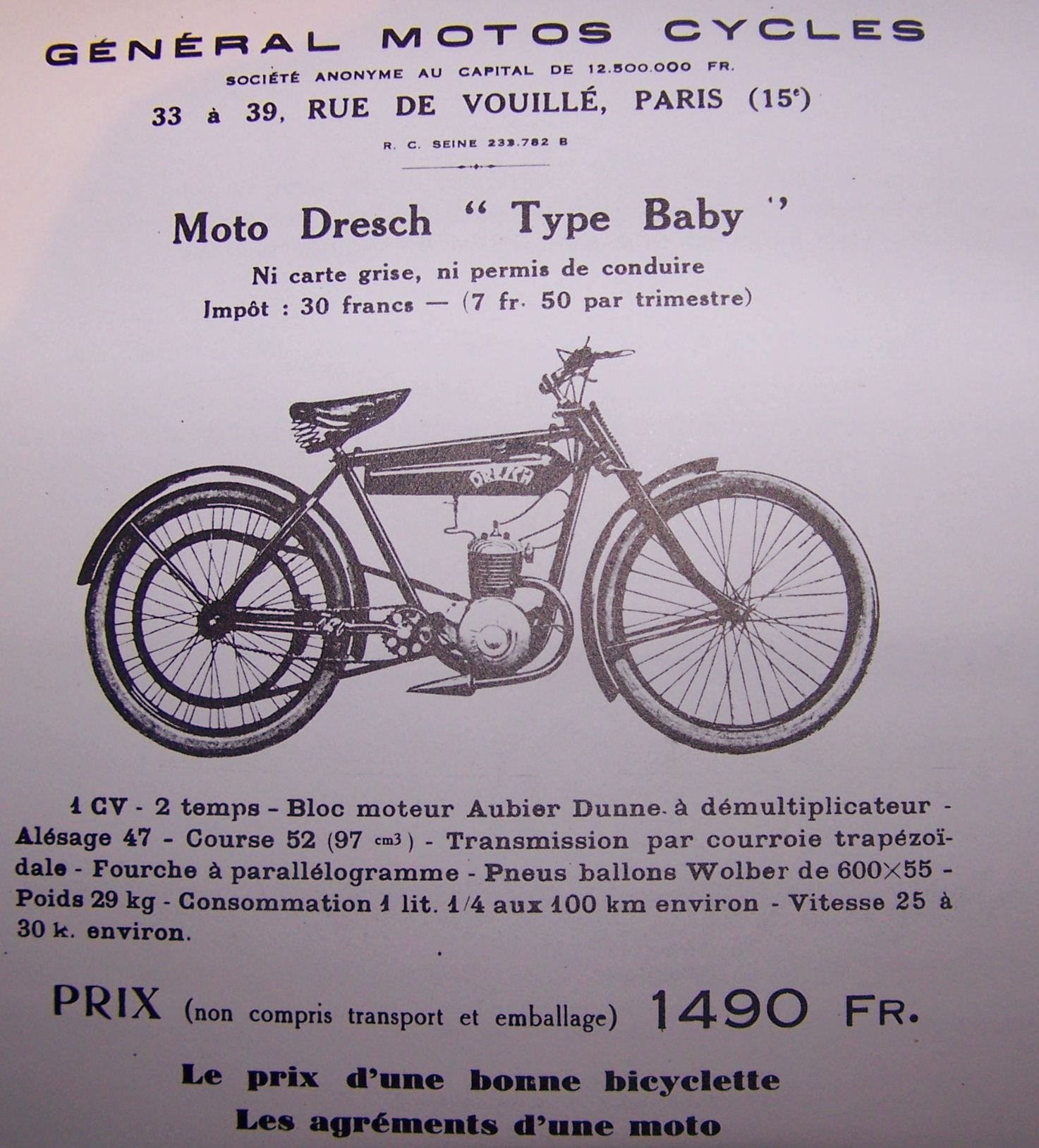 Moto Dresch type "Baby" Ænglisc: Dresch motorbike "Baby "type